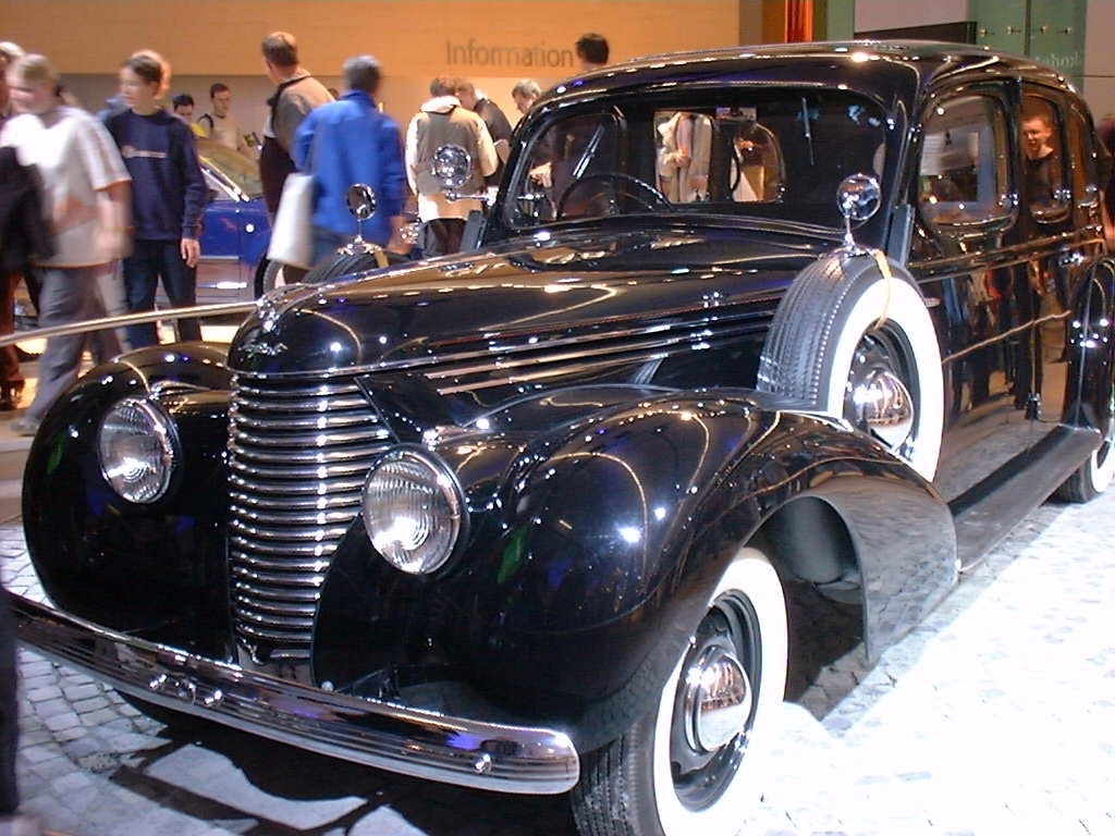 Škoda Superb OHV (typ 924), Československo 1939